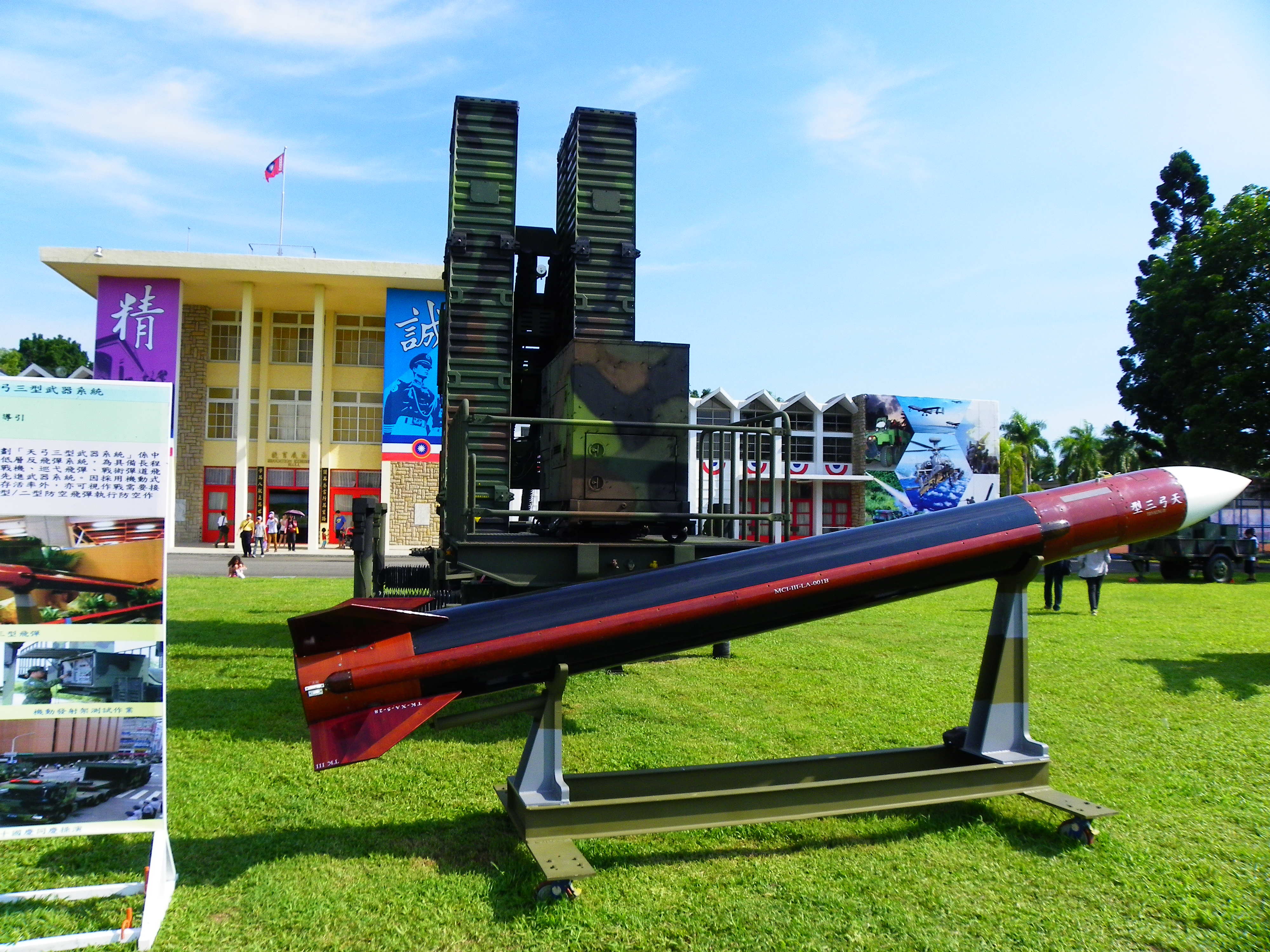 2014年陸軍官校營區開放活動，操場南側展示之天弓三型防空飛彈模型與發射器拖車。